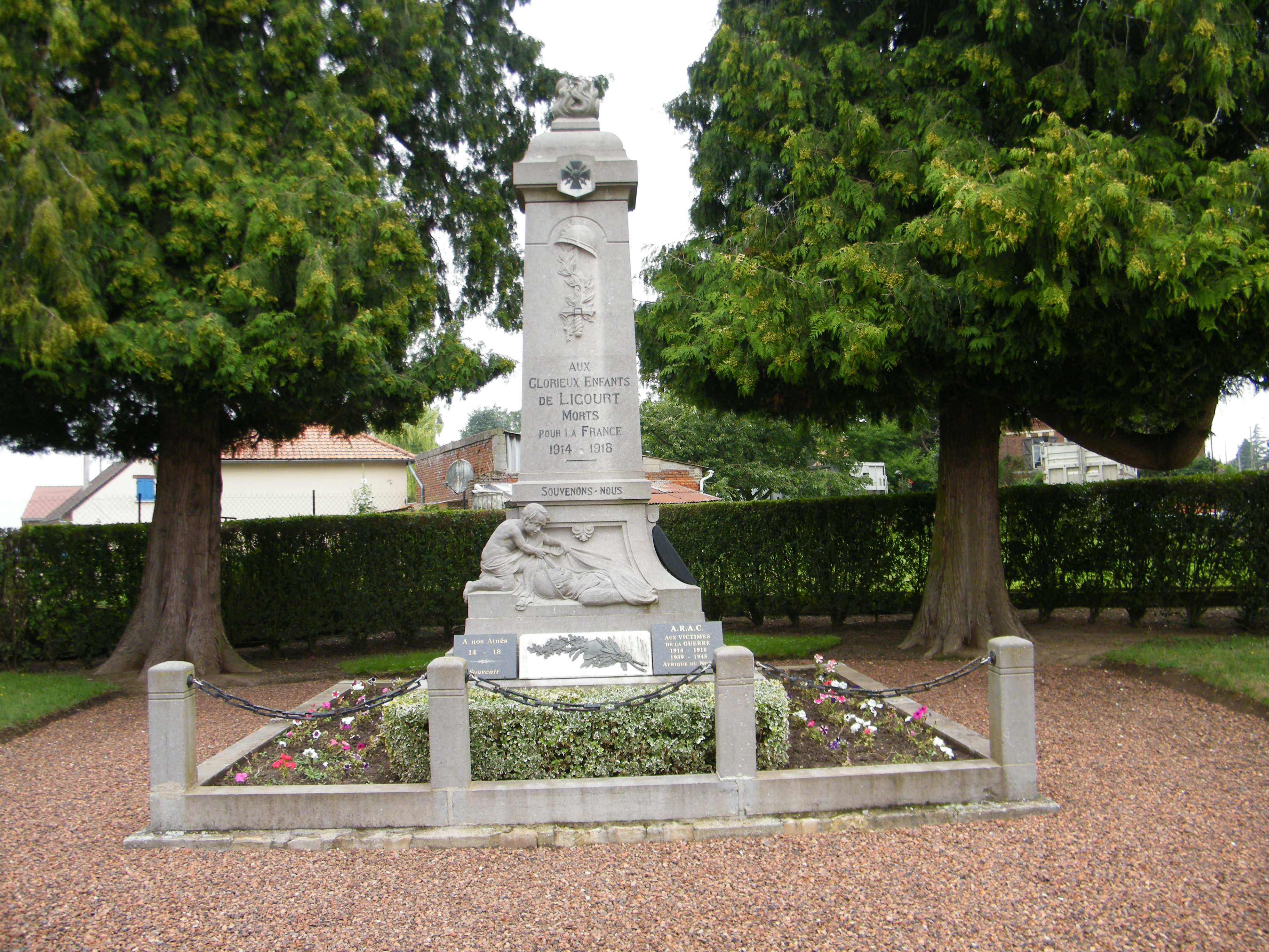 Hommages aux victimes de la guerre.